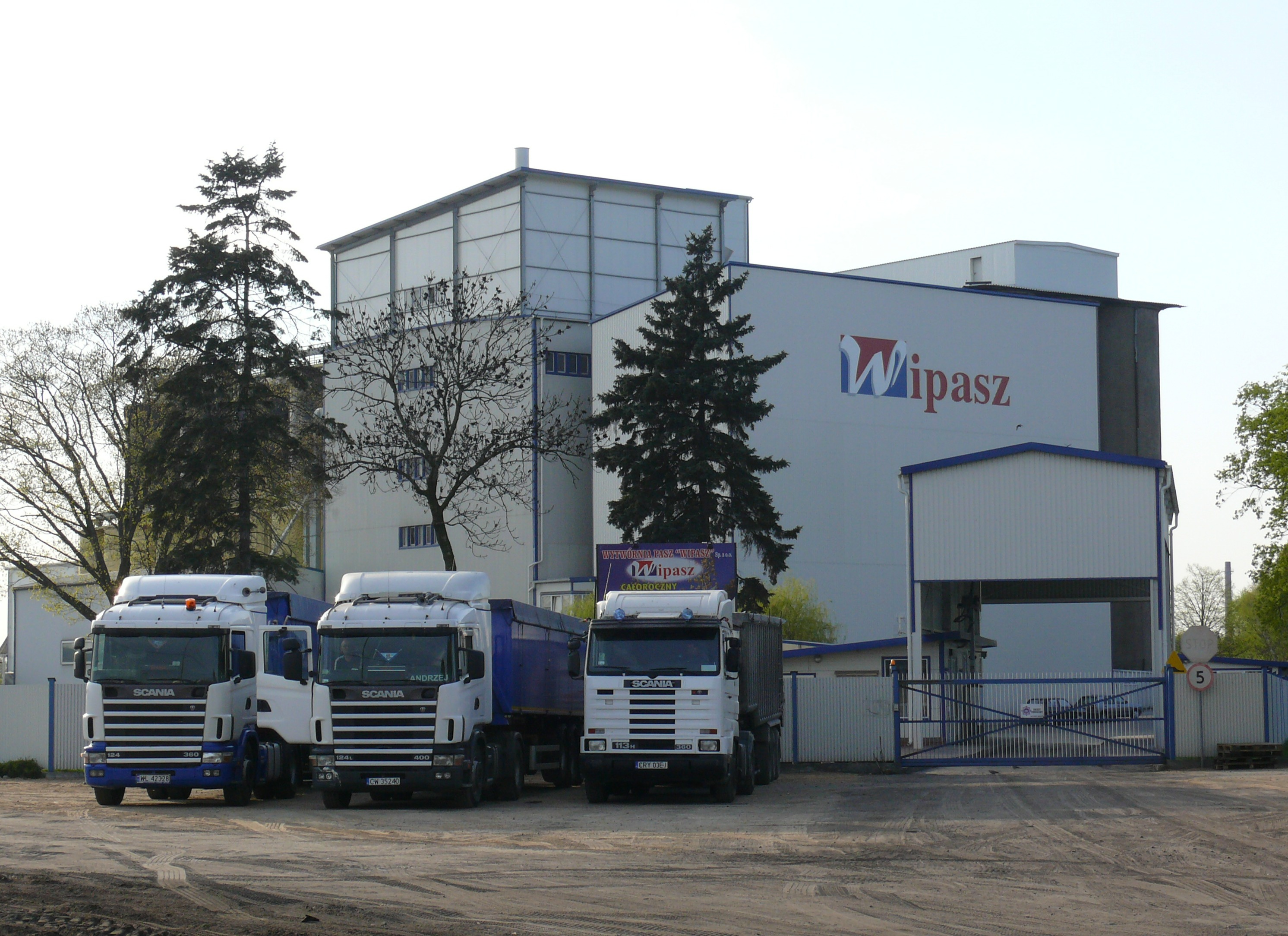 Zakład "Wipasz" w Kole